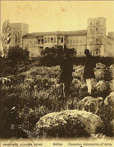 Αμυντικός Στρατώνας Άρτας, 1904.